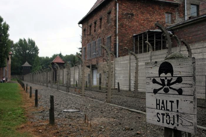 Auschwitz 2005, foto genomen door C.Kuhl